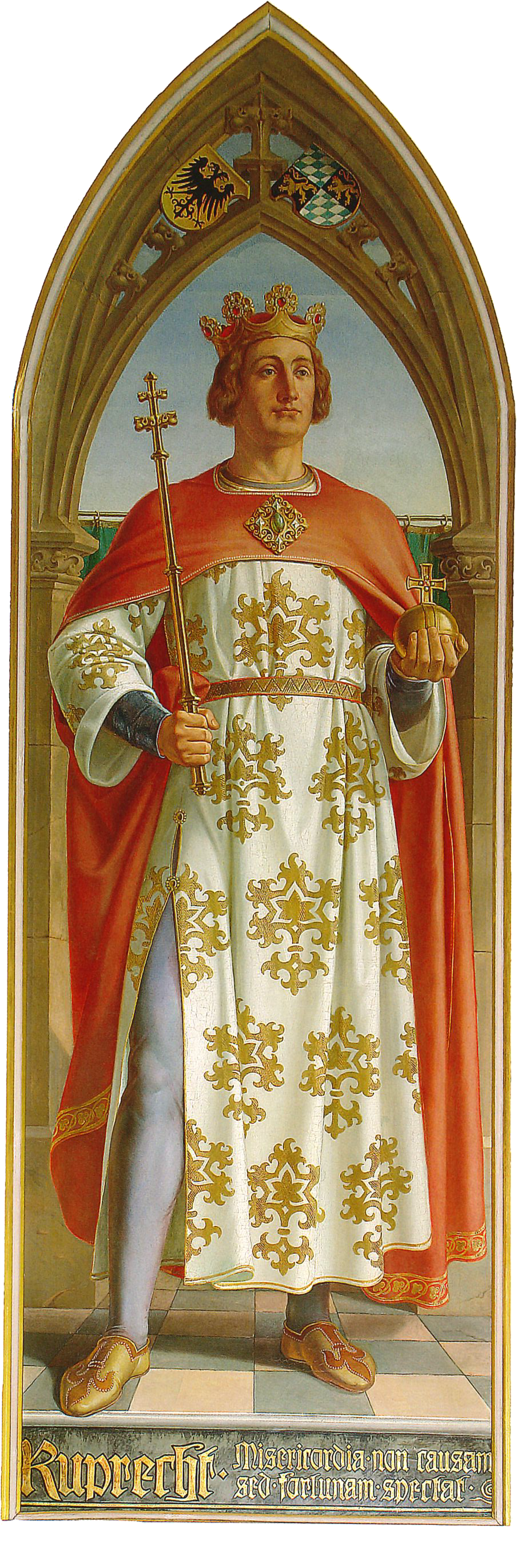 Das Gemälde ist Teil der Herrschergalerie im Kaisersaal des Hauses zum Römer im Frankfurter Rathaus und gehört zum Bestand des Historischen Museums Frankfurt am Main. Motto: Misericordia non causam, sed fortunam spectat.